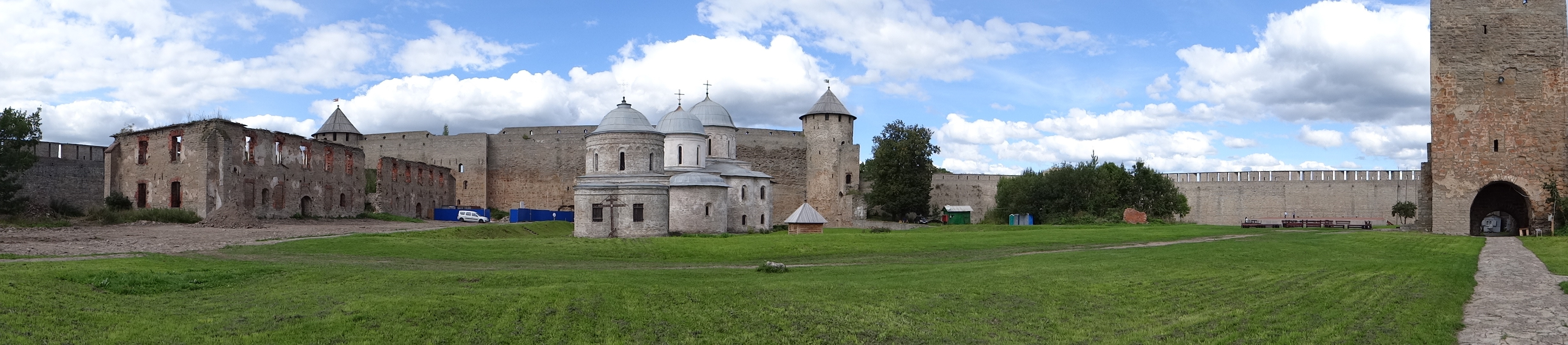 Большой Боярший город (Санкт-Петербург и Лен.область, Ивангород, Девичья Гора)